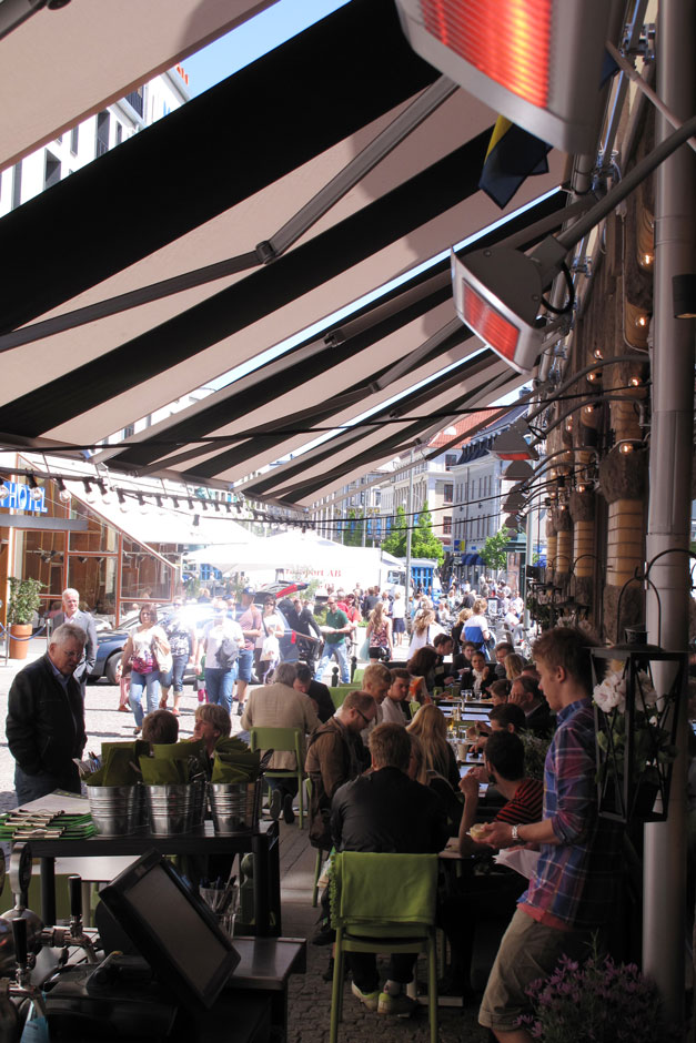 IH - Frico halogeninfravärmare (värmestrålare) uppsatta på en bar, för att värma uteserveringen.